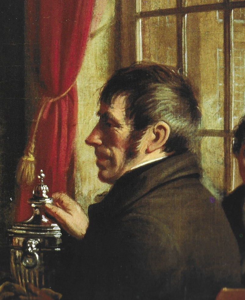 Detail van een portret van de familie van Adrianus Bonebakker met zeer waarschijnlijk Dirk L. Bennewitz, hij houdt een zilveren kastanjevaas of tabakspot in de hand